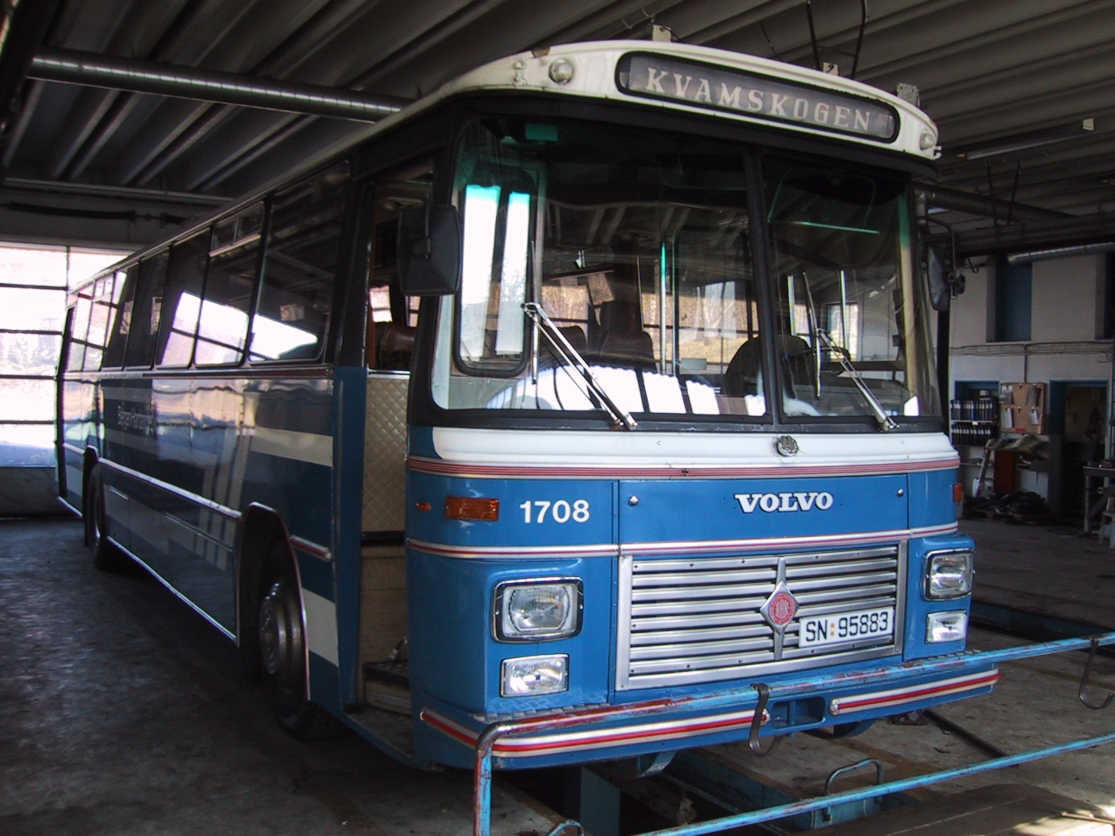 Bildet er tatt på verkstedet til HSD Buss AS på Kronstad i Bergen sommeren 2003.